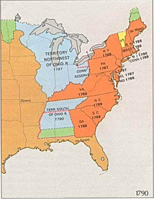 Territoire du Nord-Ouest 1790